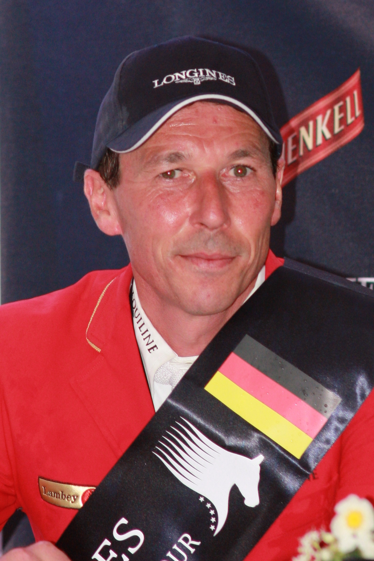 77. Internationales Pfingstturnier Wiesbaden 2013, Hans-Dieter Dreher während einer Pressekonferenz Personality rights warning Although this work is freely licensed or in the public domain, the person(s) shown may have rights that legally restrict certain re-uses unless those depicted consent to such uses. In these cases, a model release or other evidence of consent could protect you from infringement claims.